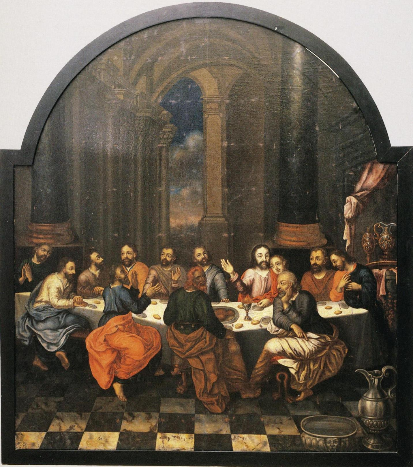 Margareta Capsian maalaama Pedersören kirkon alttaritaulu, nykyään Kansallismuseossa. Tämä on Capsian Suomeen tekemistä alttaritauluista ensimmäinen, tunnetuin ja ainoa signeerattu. Sommitelman esikuvana on Matthäus Merianin ehtoolliskuva vuoden 1630 Raamatusta.